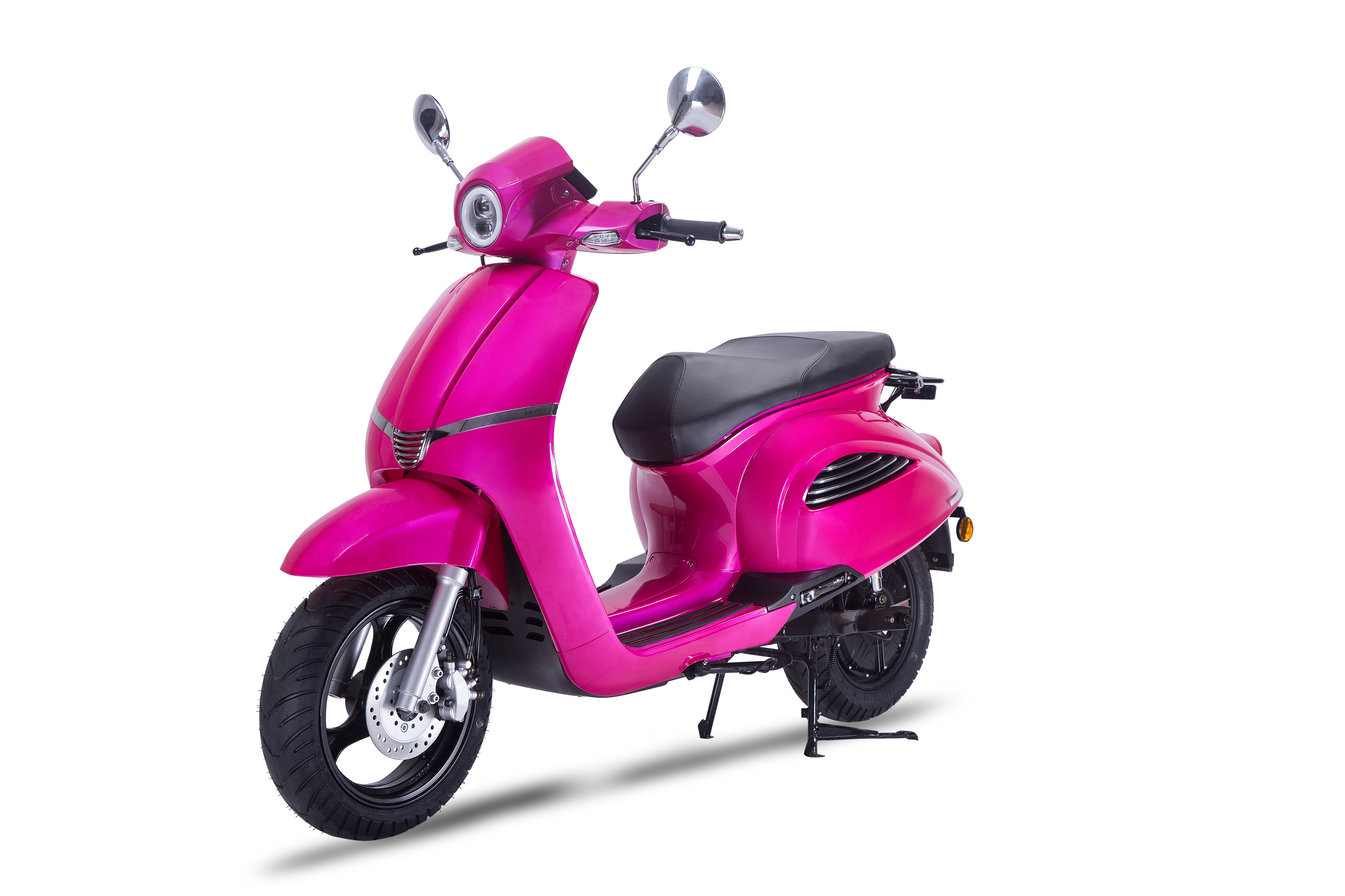 GOVECS Elly 1